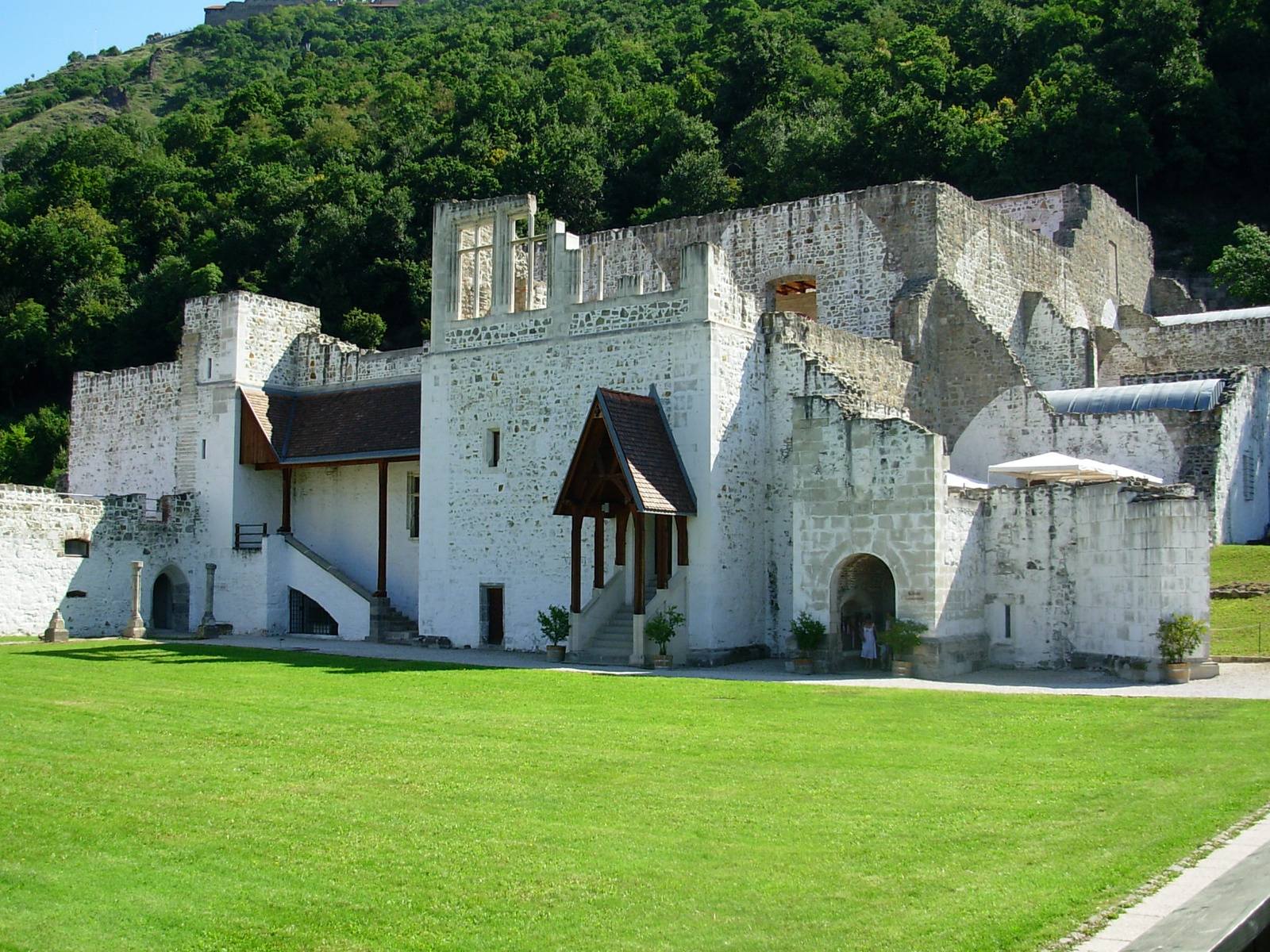 Királyi palota maradványai (Visegrád, Fő u. 27-29.)